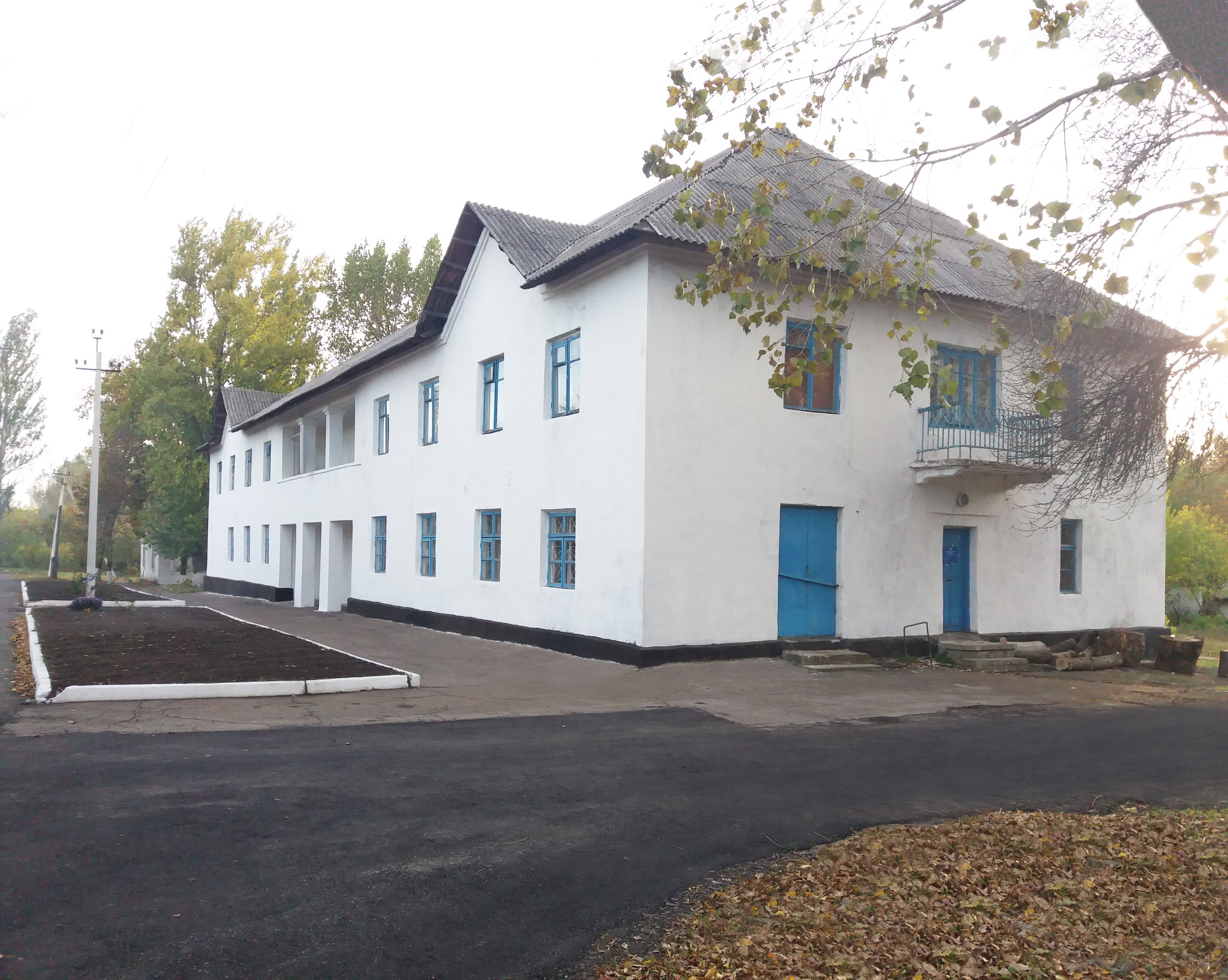 Заліснянська селищна рада